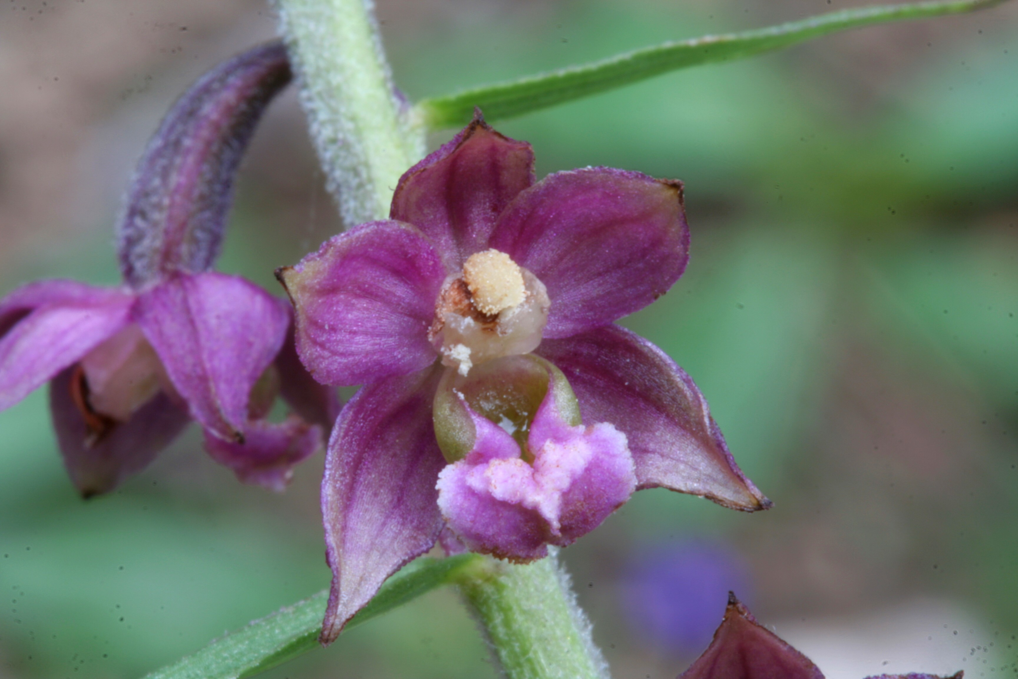 Epipactis_atrorubens (Elleborina violacea) Località : Cortina (BL), 1400 m s.l.m.